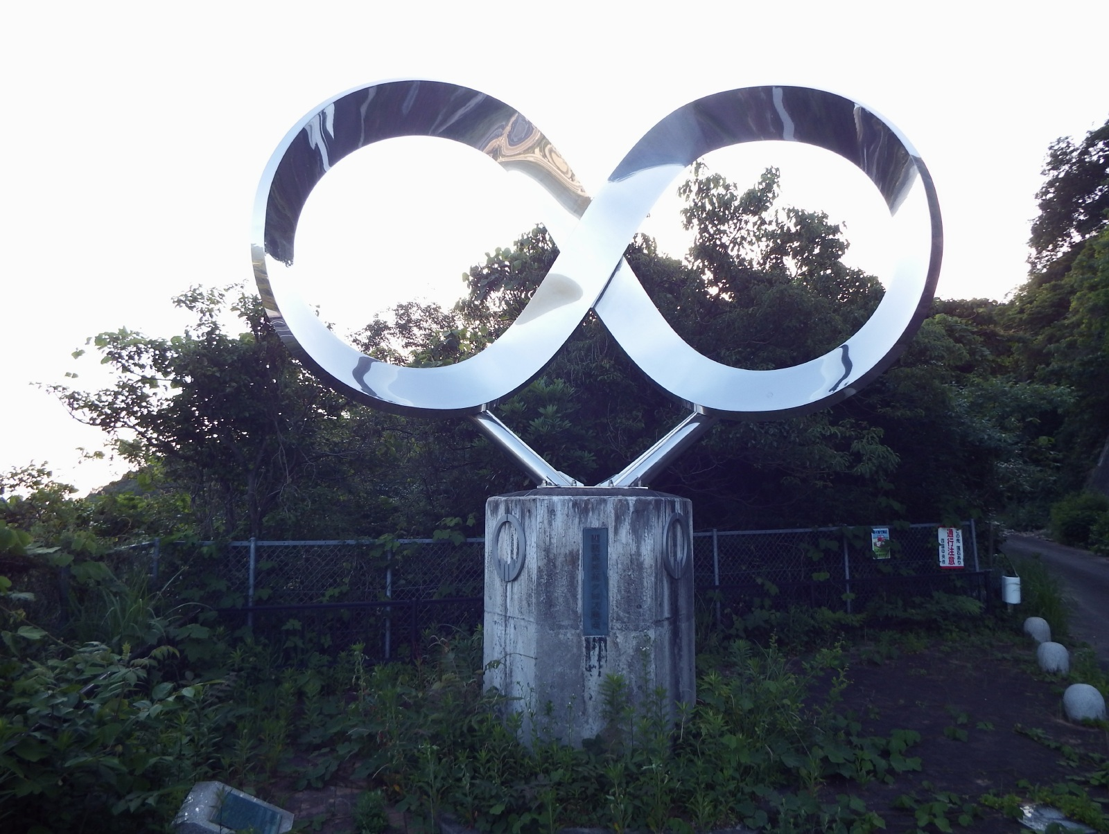 川之江東ジャンクションの四国高速道路クロス地点モニュメント